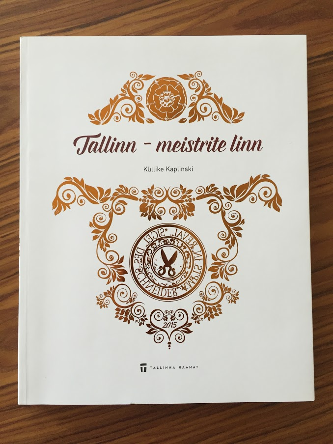 "Tallinna Raamatu" sarjas 2015. aastal ilmunud Küllike Kaplinski "Tallinn - meistrite linn"